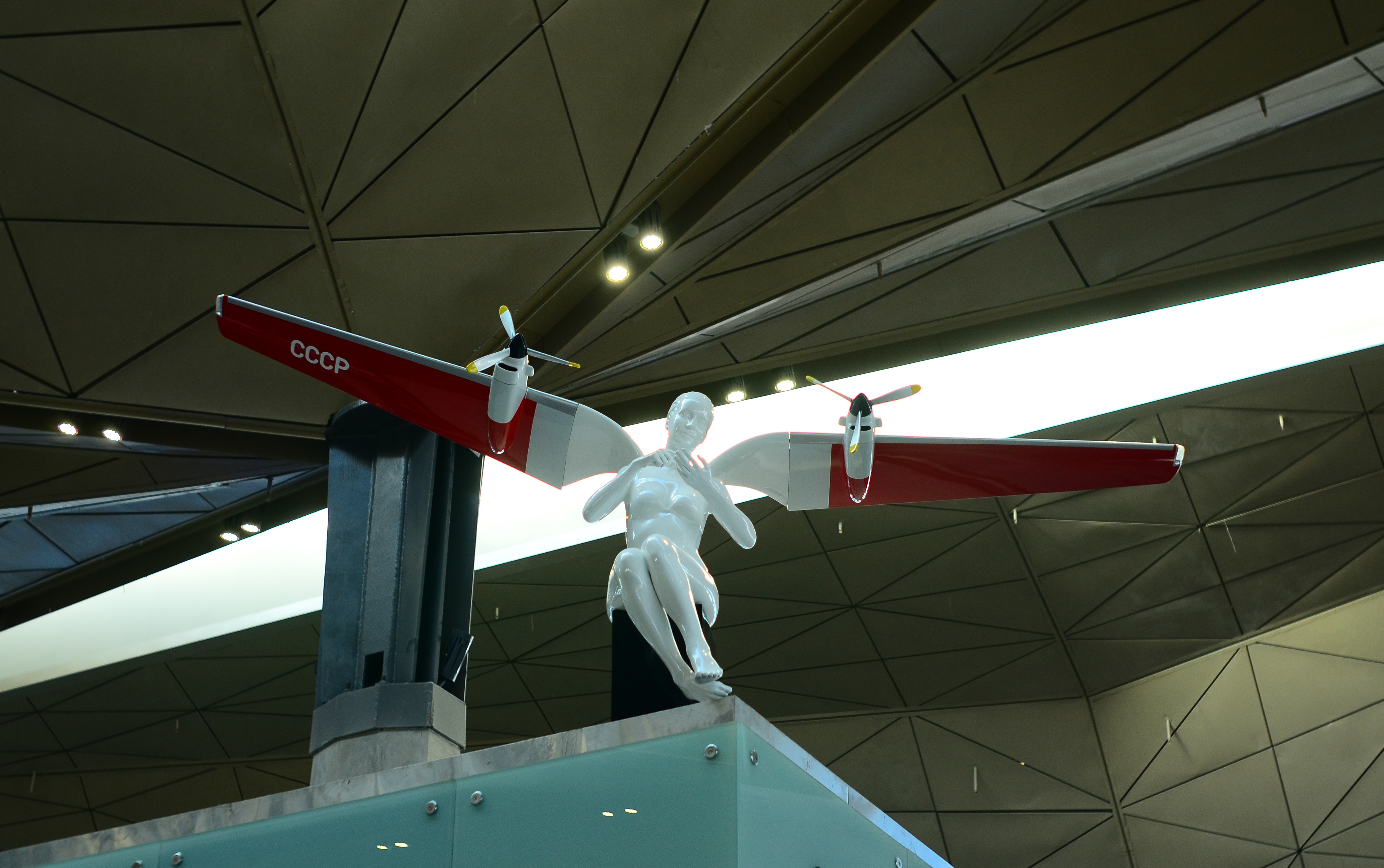 Ангелы Эрарты в аэропорту Пулково